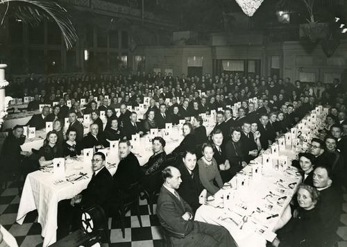 Groepsfoto van meer dan honderd Nationale Steunfonds medewerkers, gezeten aan lange tafels, in Krasnapolski 1946